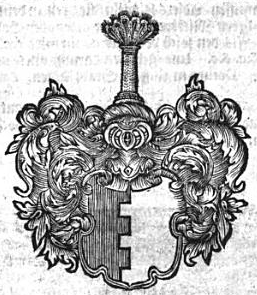 Wapen von de Familie von Brobargen (afbillt bi Luneberg Mushard)